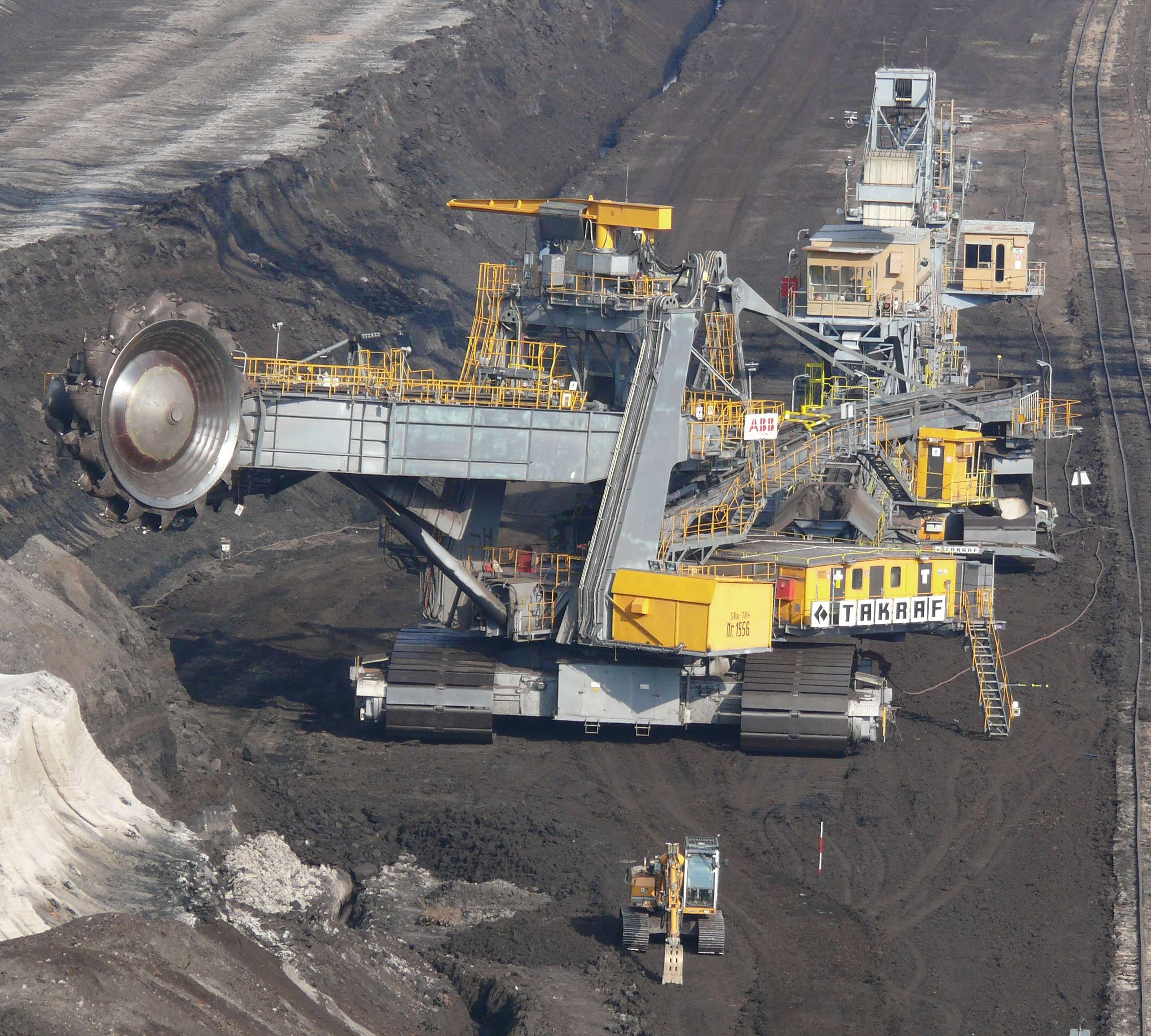 Größenvergleich zwischen Schaufelradbagger und gewöhnlichem Bagger, im Tagebau Cottbus-Nord